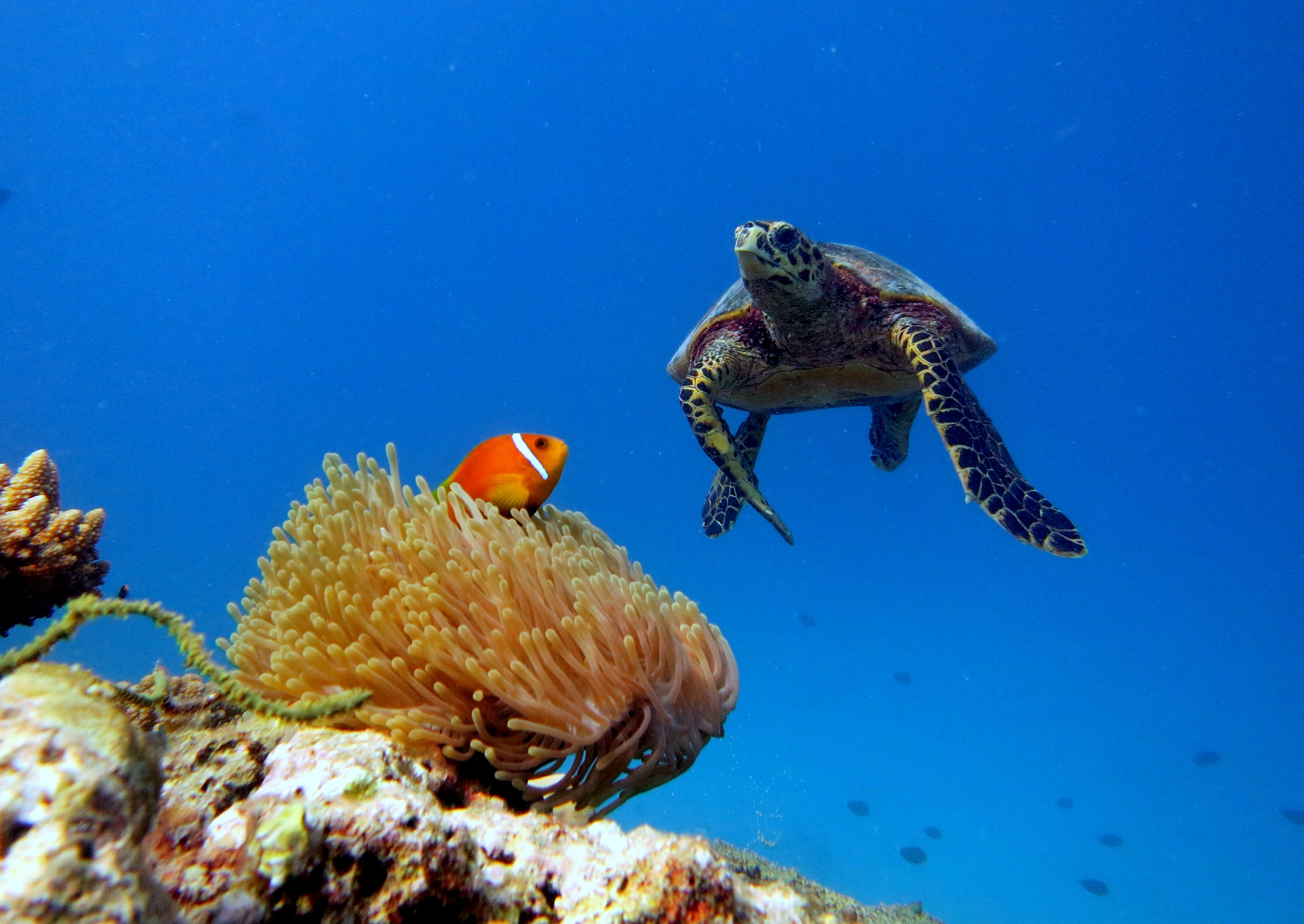 Une tortue imbriquée et un poisson-clown des Maldives dans son anémone magnifique, à l'atoll de Baa (Maldives).